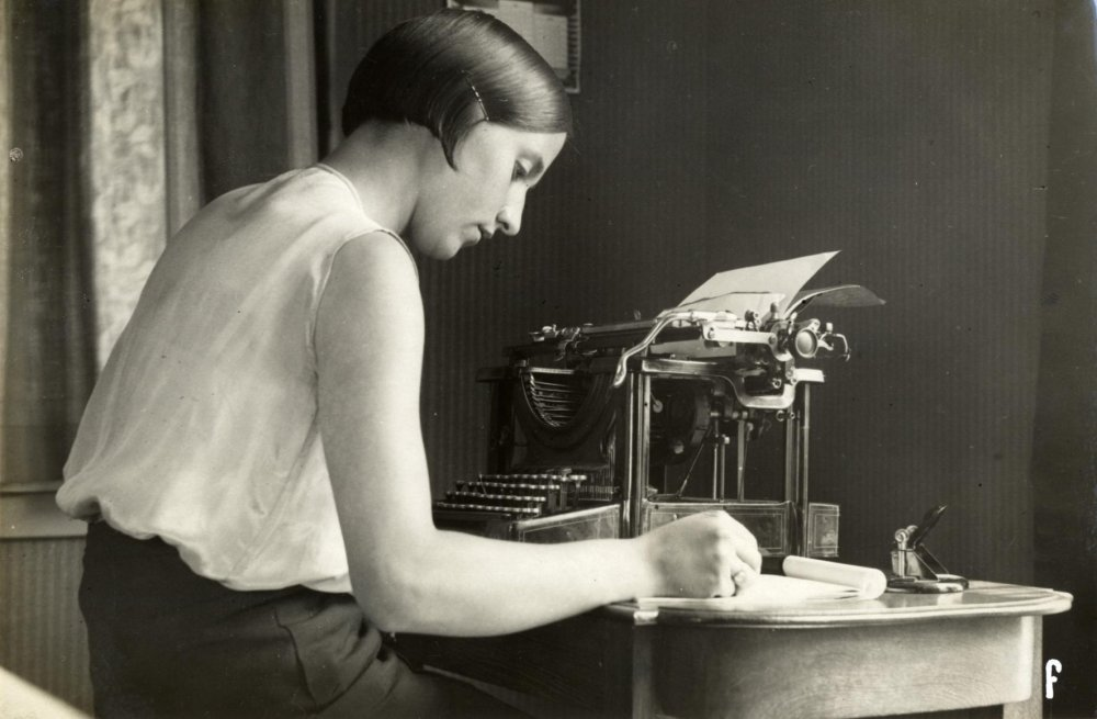 Stenotypisten. Athlete Cor Aalten, estafetteloopster op de Olympische Spelen in Los Angeles, als stenotypiste bij de firma Gerritsen en van Kempen, zilverfabriek. Nederland, Zeist, 1932..